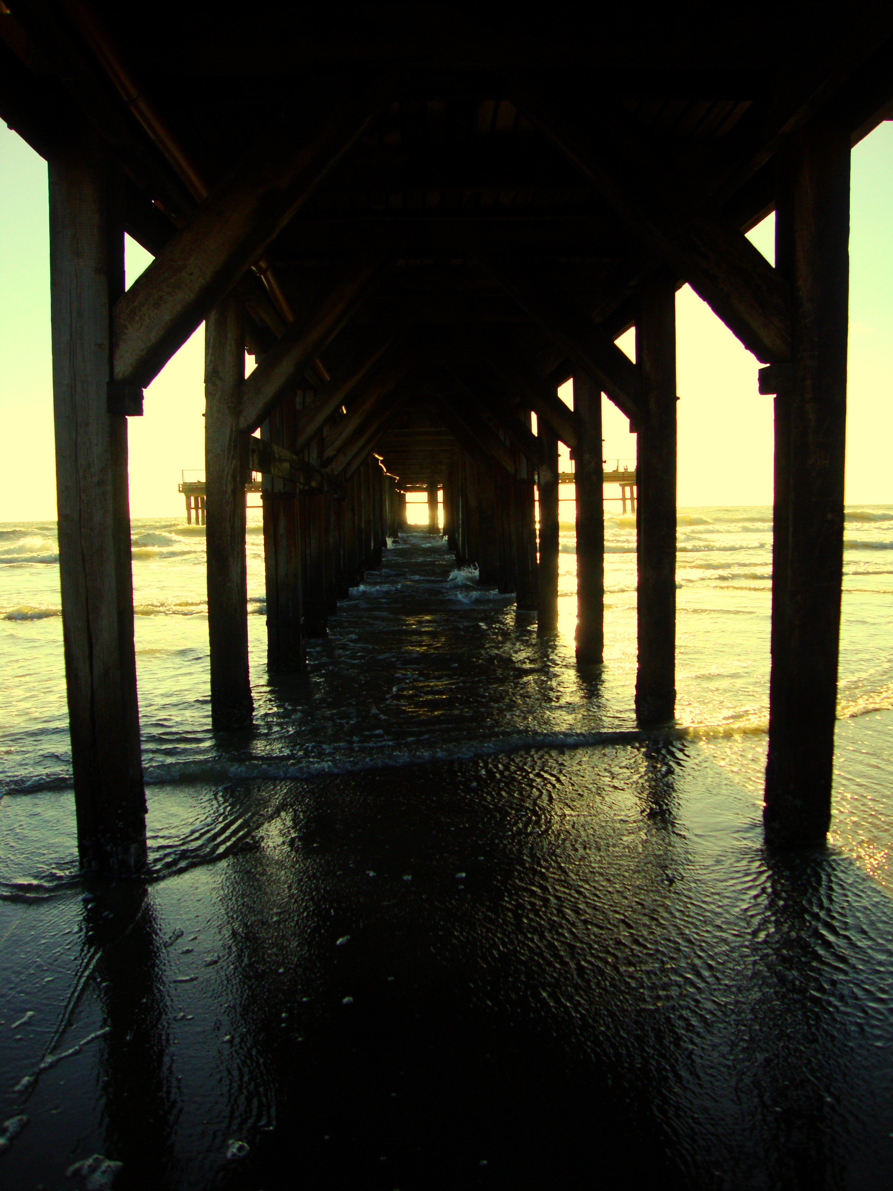 Fotografía del muelle de Santa Teresita en la calle 38 y playa.